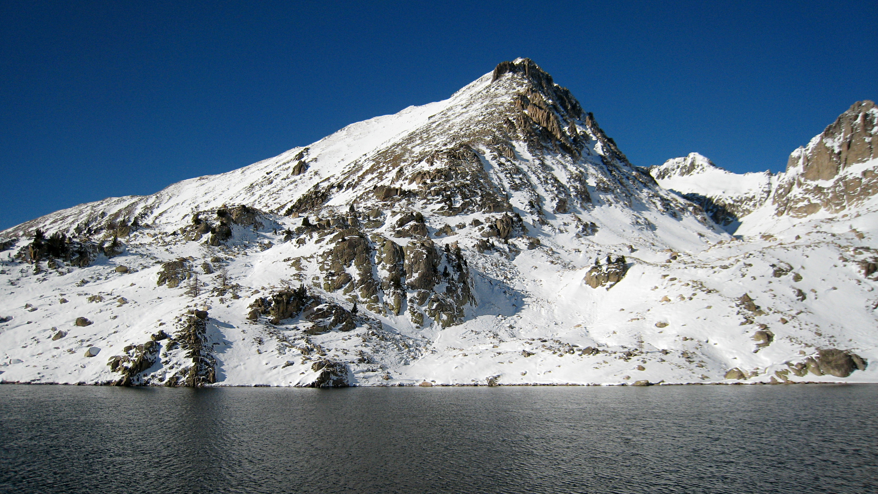 Pointe Giegn et lac Negre